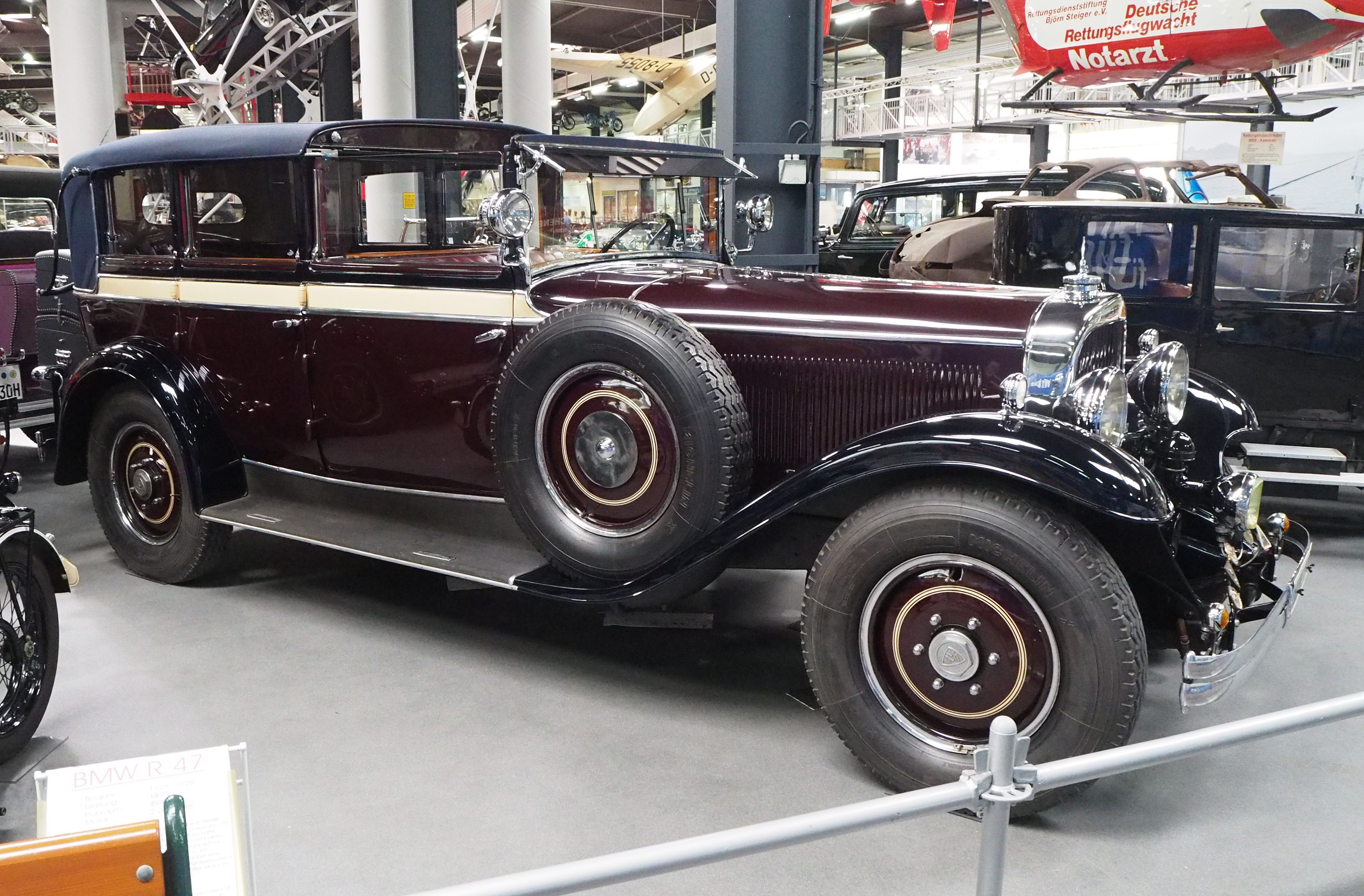 1930 Maybach Zeppelin DS7